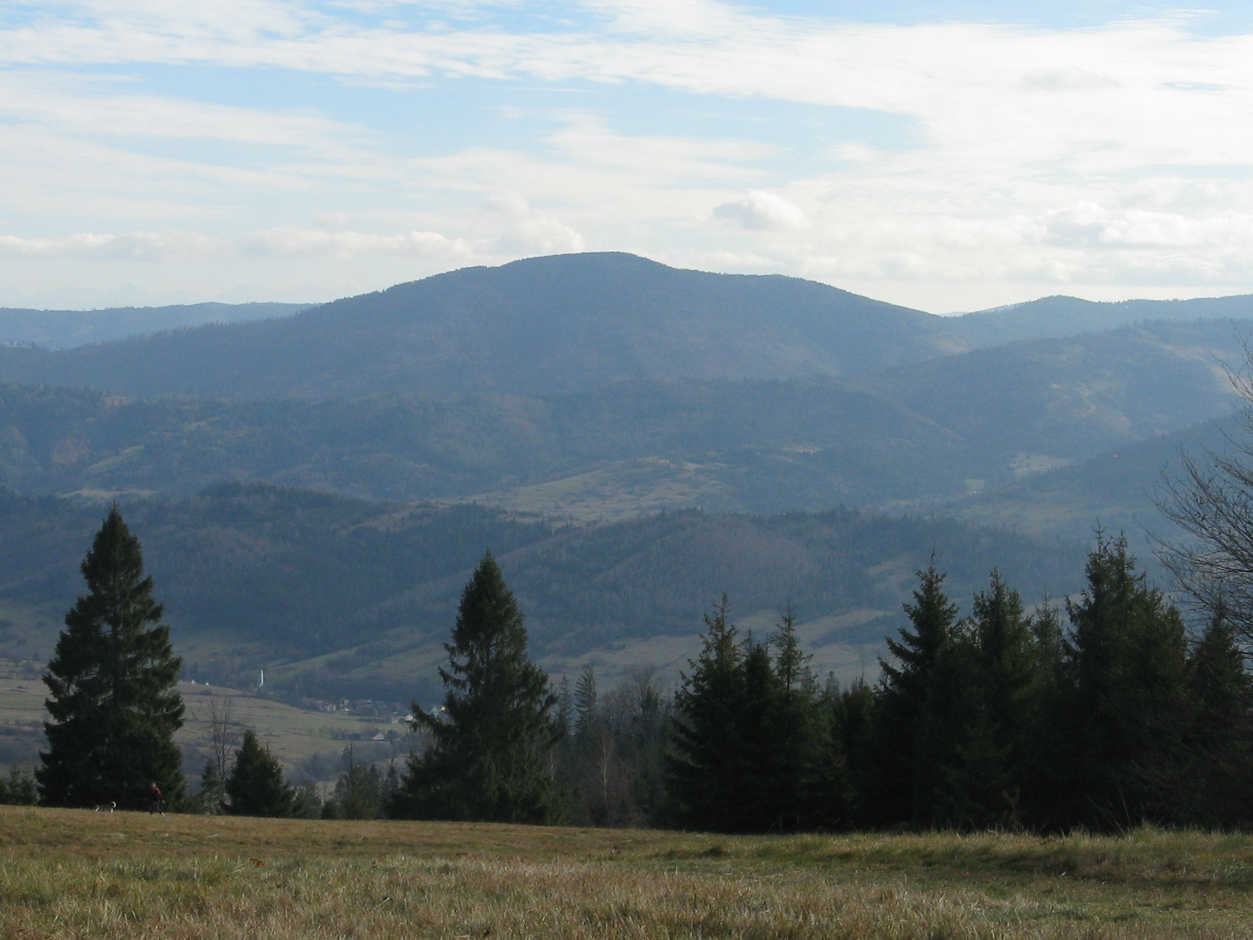 Muńcuł, Kotarz i Wiertalówka z Rachowca.